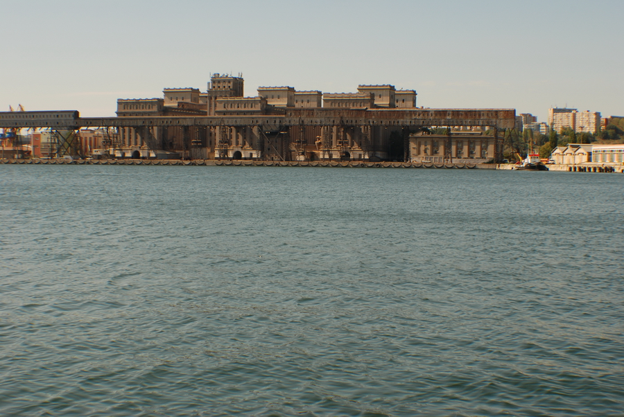 Silozurile Anghel Saligny din portul Constanta